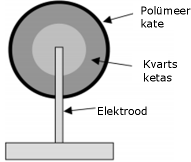 kvartskristallsensor